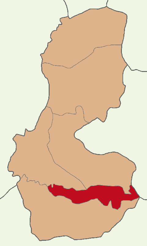 Hasankeyf ilçesinin konumu